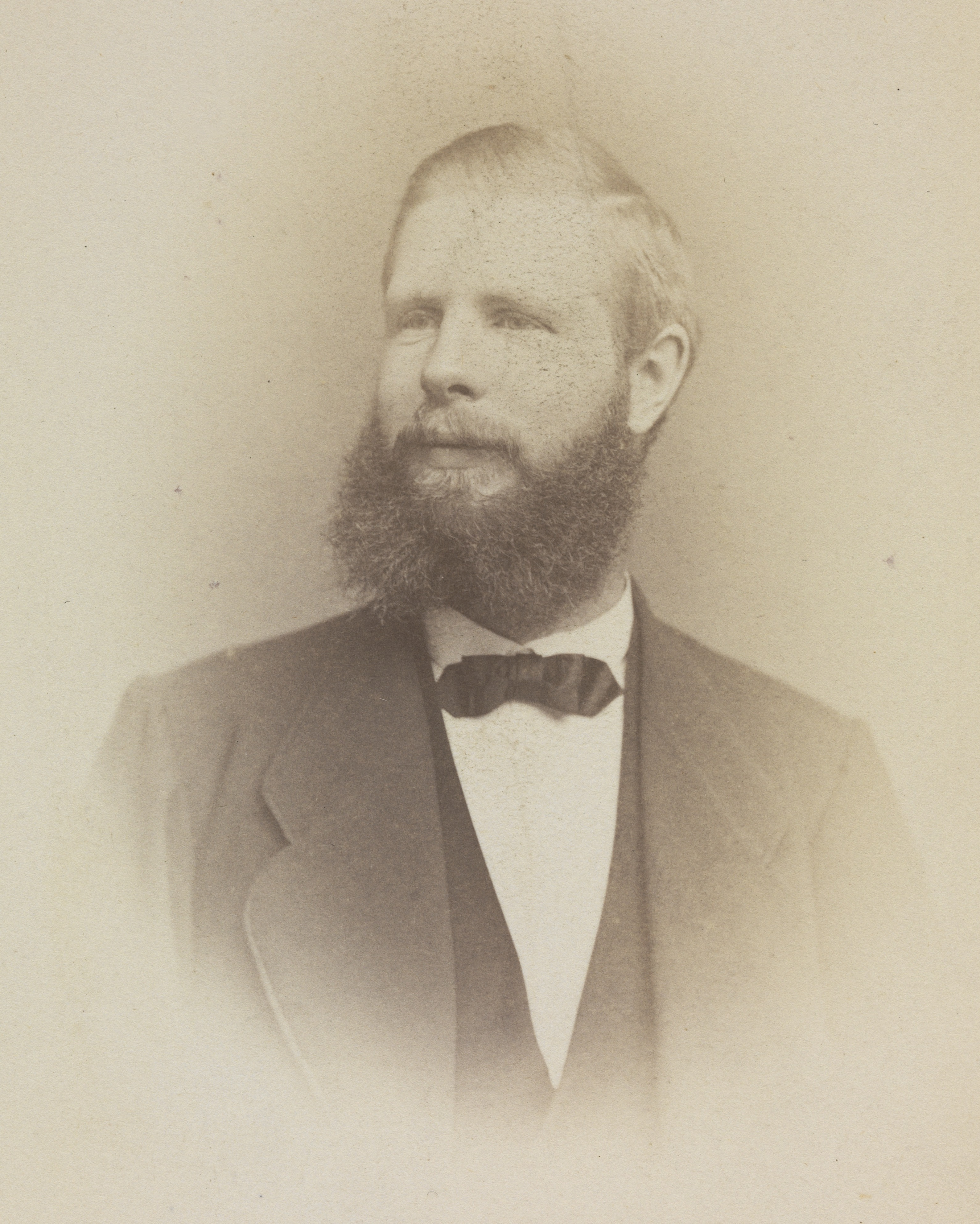 Ole Wilhelm Lund, oberstløitnant. Depicted person: Lund, Ole Wilhelm (1848-1915) Depicted place: Oslo